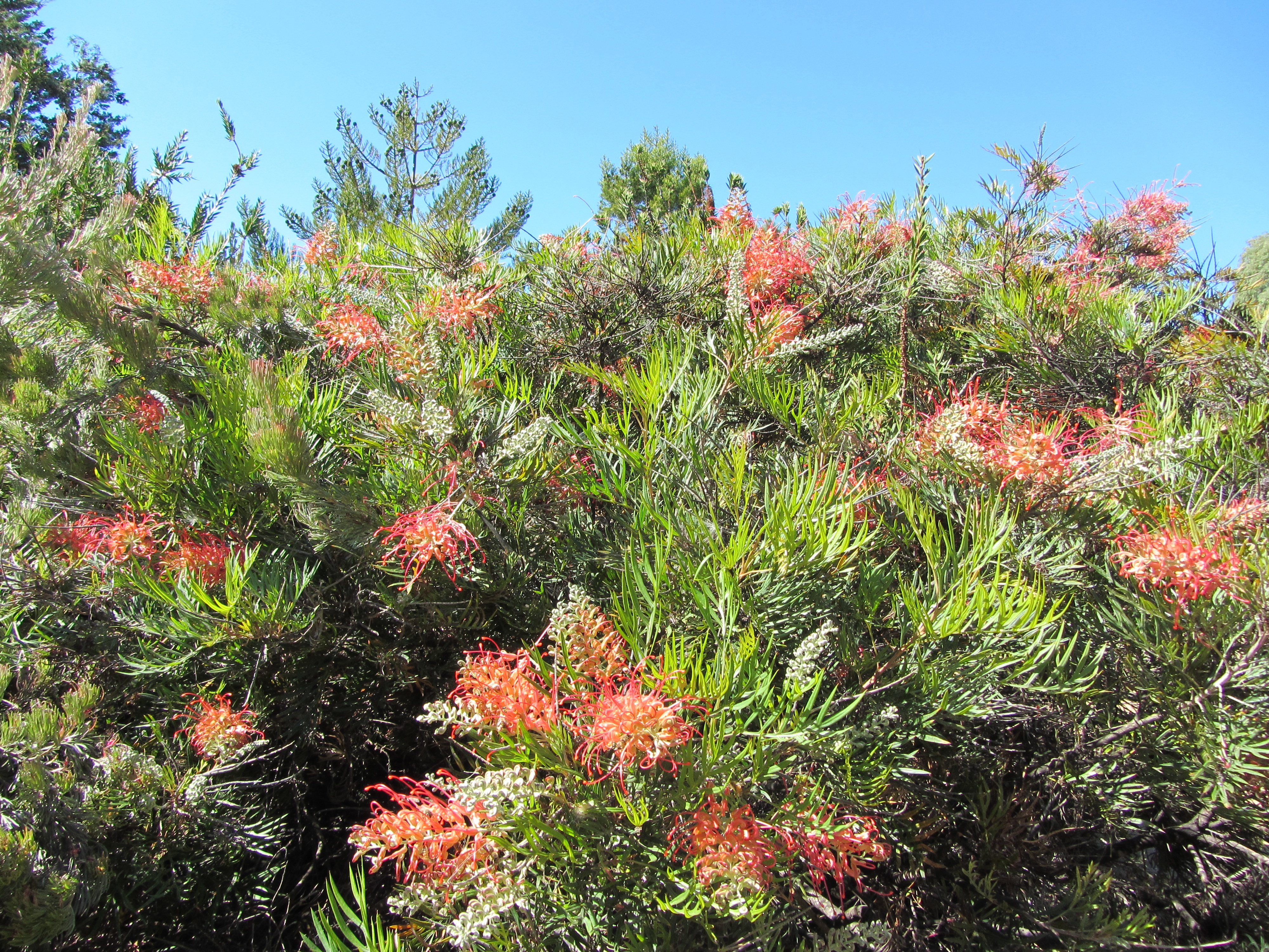 Grevillea 'Robyn Gordon'